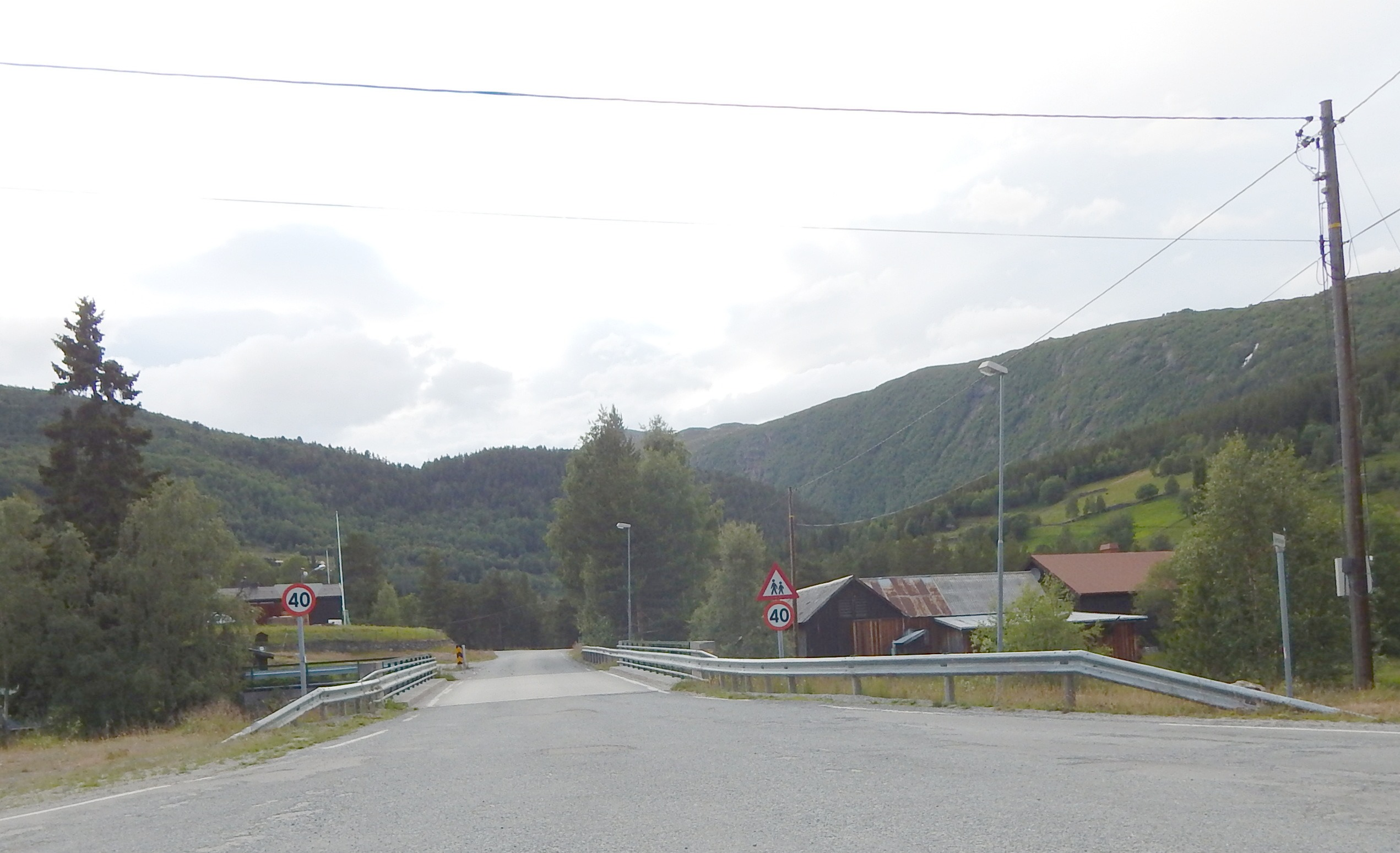 Bøverdalsvegen (fylkesvei 2642) over Leira bru, sett fra riksvei 55